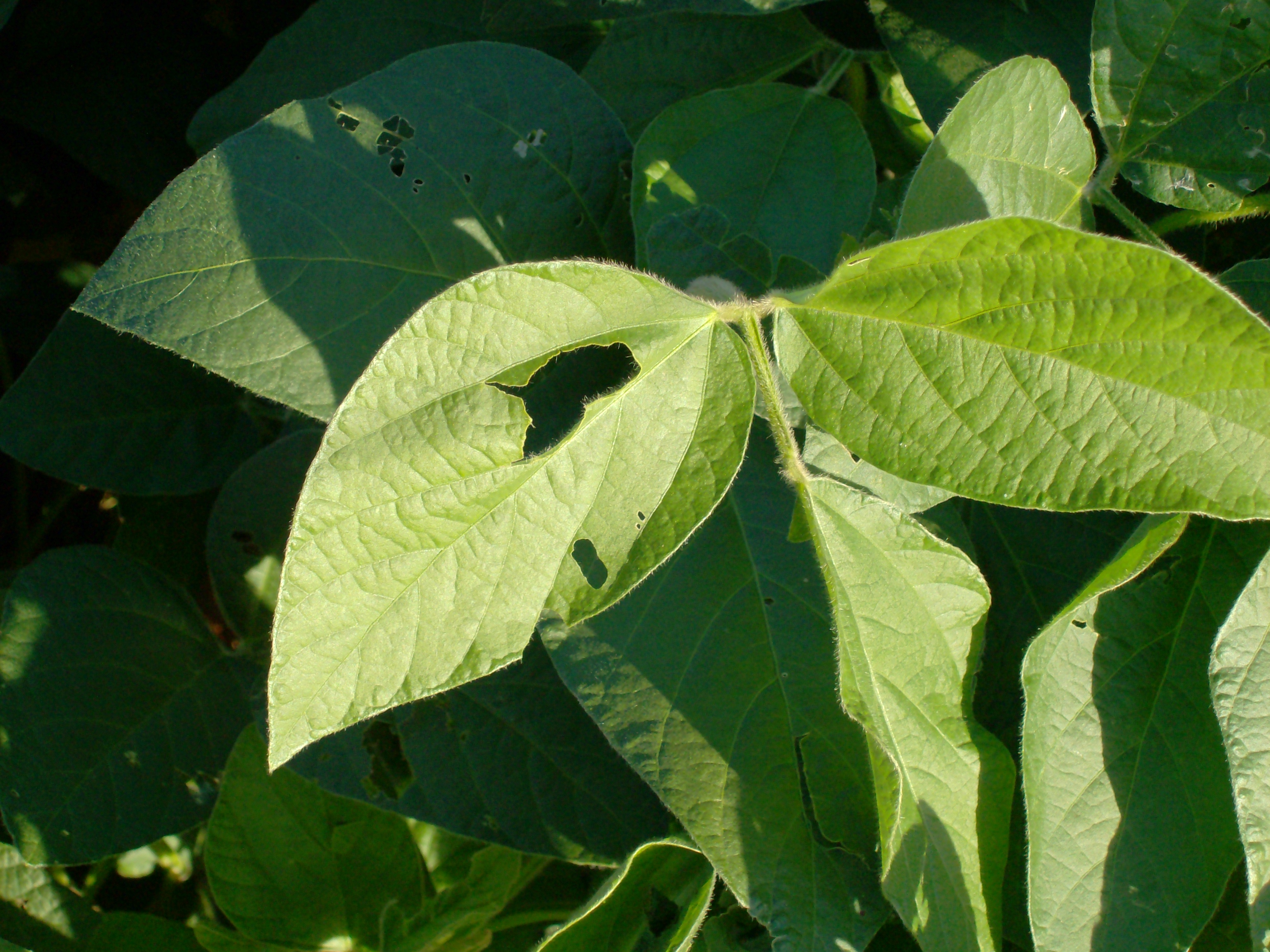 Foto de Cultivo de Soja. Se puede observar la hoja que pose parte que fue desfoliada por el Orugas Desfoliadoras. Las Orugas se alimentan de las hojas de la planta.